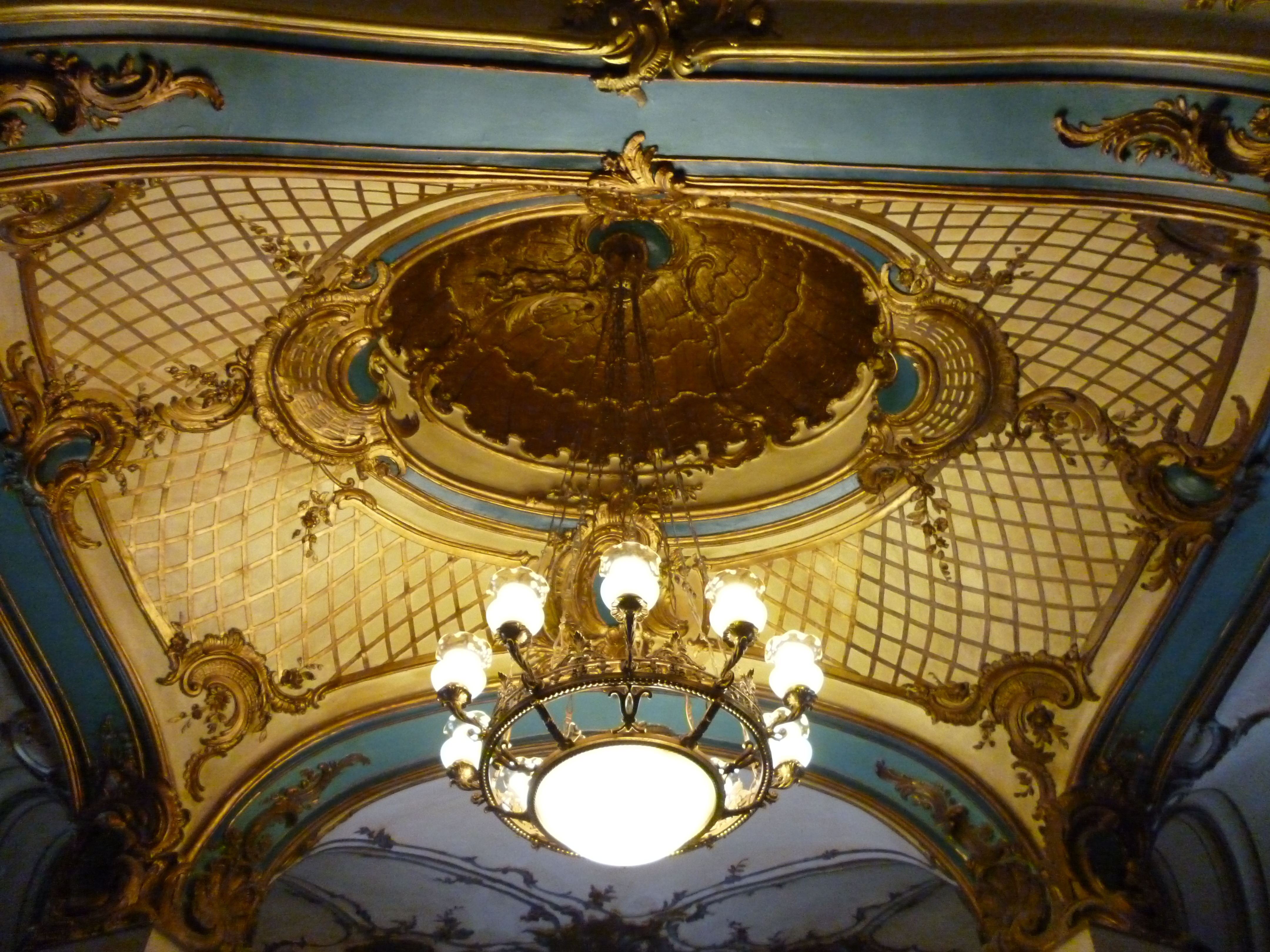 Сандуновские бани: Неглинная ул., дом 14, строение 1А, Мещанский, Центральный округ, Москва